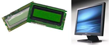 LCD d'una calculadora i monitor LCD